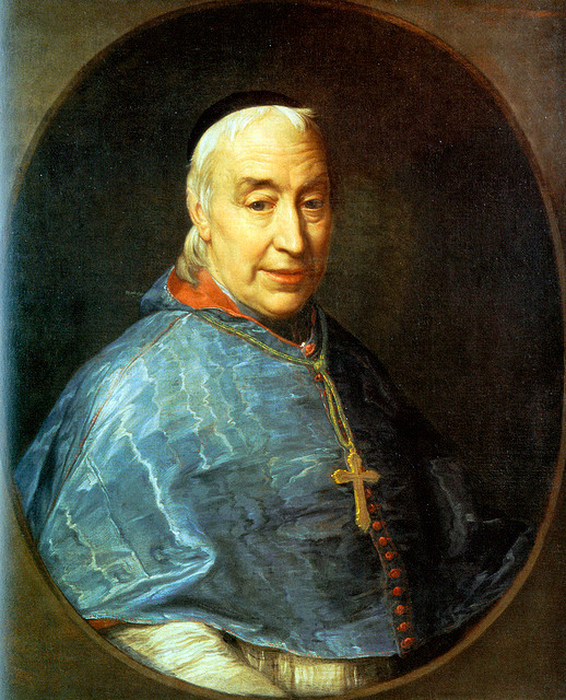 Retrato del arzobispo de Lucca Giovanni Domenico Mansi (1692-1769)